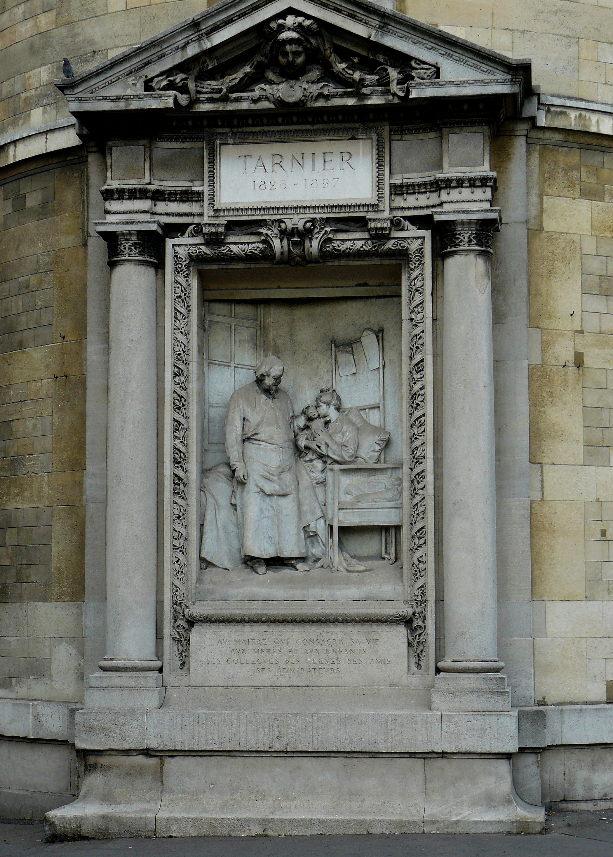 Denys Puech, Monument au professeur Tarnier (1905), obstétricien, au coin de l'avenue de l'Observatoire et de la rue d'Assas, Paris 6e